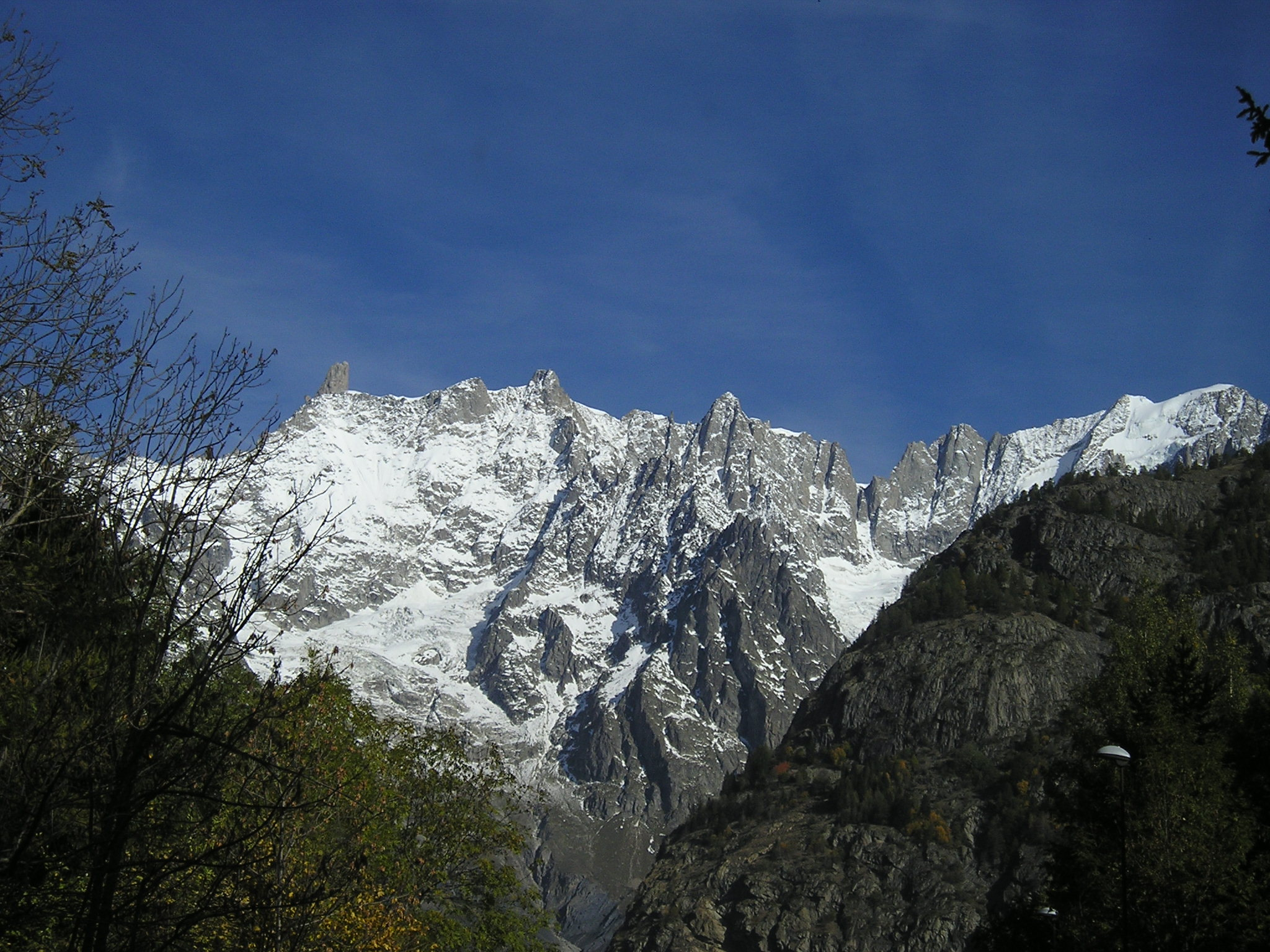 Il Monte Bianco ripreso da Courmayeur (ottobre 2003); autore Massimo Macconi